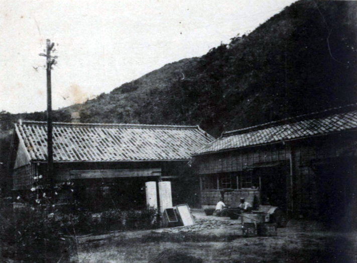 中文（台灣）: 1923年，殖產局基隆鰹節製造試驗所成立